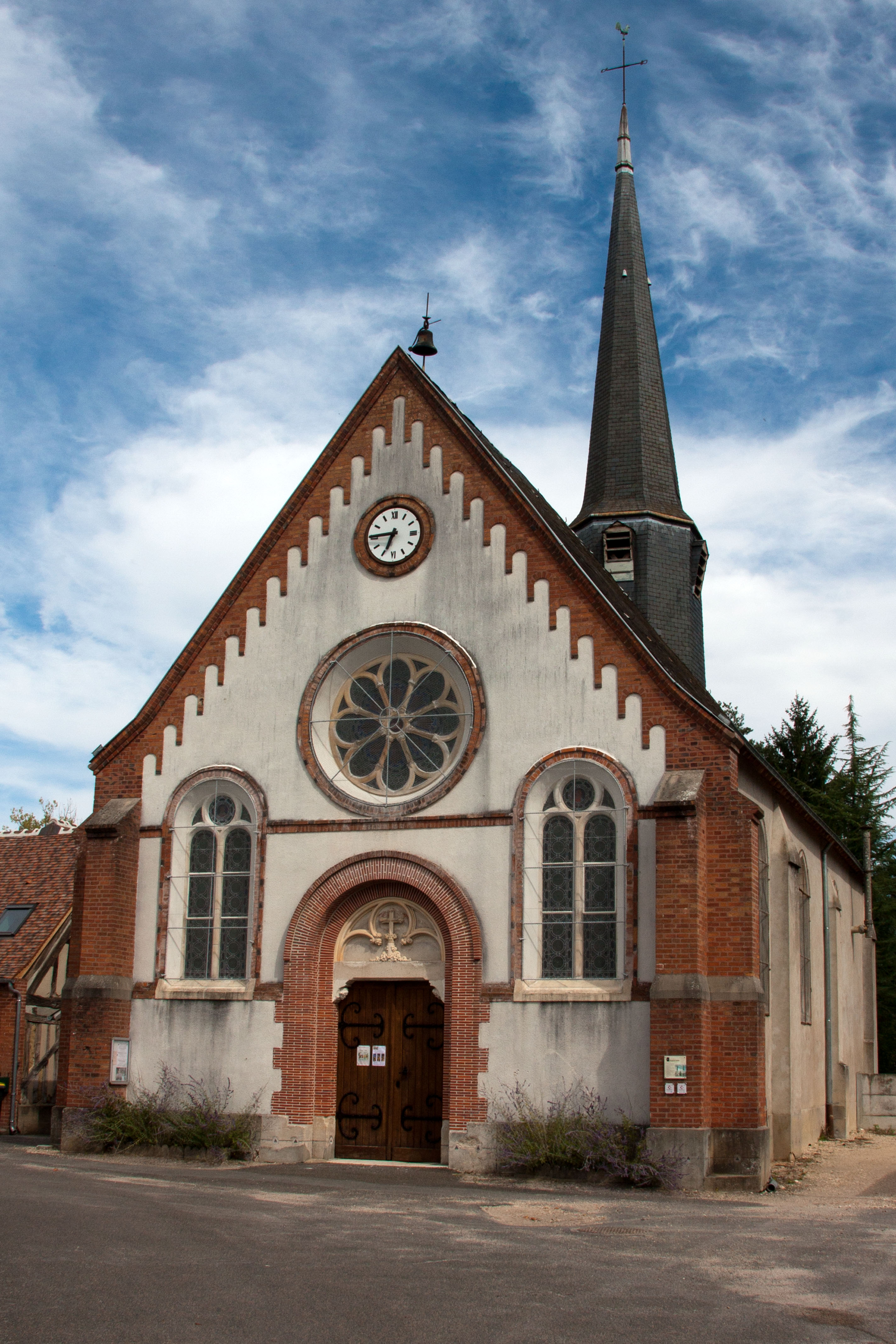 Eglise de Chaon, Loir-et-Cher, France